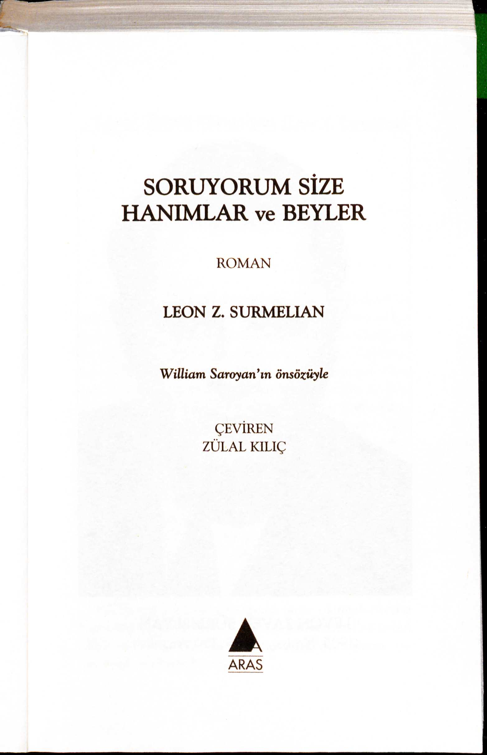 Leon Surmelian Soruyorum size, hanımlar ve beyler 2013. (I ask you, ladies and gentlemen) Übersetzung ins Türkische.